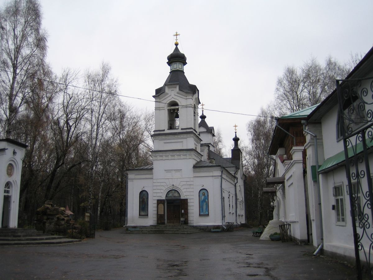 Михайловское кладбище